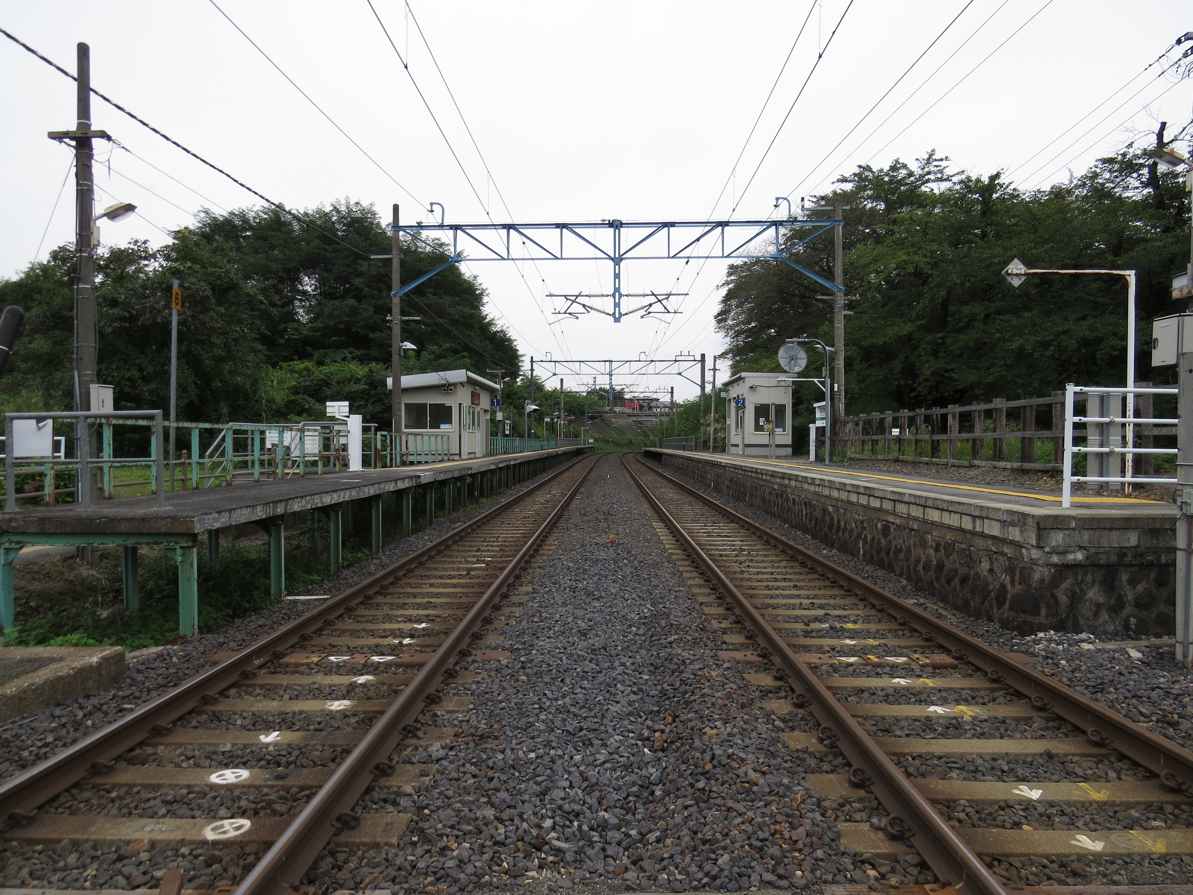 JR東日本 茂吉記念館前駅 駅構内